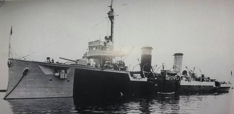 Crucero explorador B.A.P. Coronel Bolognesi 1º al ancla en Talara, 1942. En dicho puerto se halla hoy en día una de las principales refinerías de petróleo de la costa peruana, que por aquel entonces era de propiedad de la International Petroleum Company y era frecuentado por petroleros aliados que se reabastecían allí de combustible. Por ese motivo, desde 1942 hasta el término de la Segunda Guerra Mundial, las unidades de la escuadra fueron destinadas a patrullar el litoral norte en previsión de cualquier intento del enemigo para atacar dicho punto estratégico. El Coronel Bolognesi, al igual que otros barcos peruanos, fue camuflado como puede observarse en la presente fotografía.